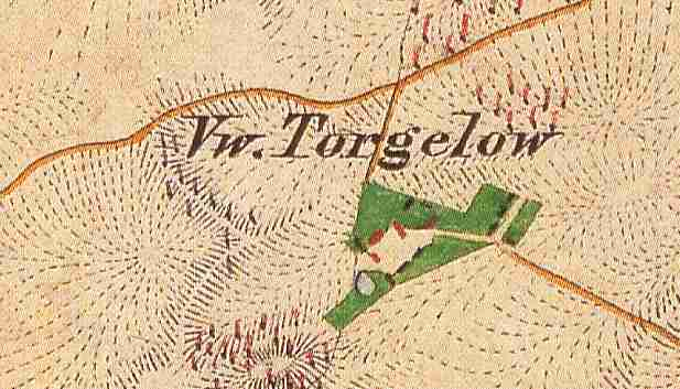 Torgelow, Gemeindeteil von Dannenberg/Mark, Ortsteil der Gemeinde Falkenberg, Landkreis Märkisch-Oderland, Brandenburg, Deutschland, Ausschnitt aus dem Urmesstischblatt 3249 Heckelberg von 1844